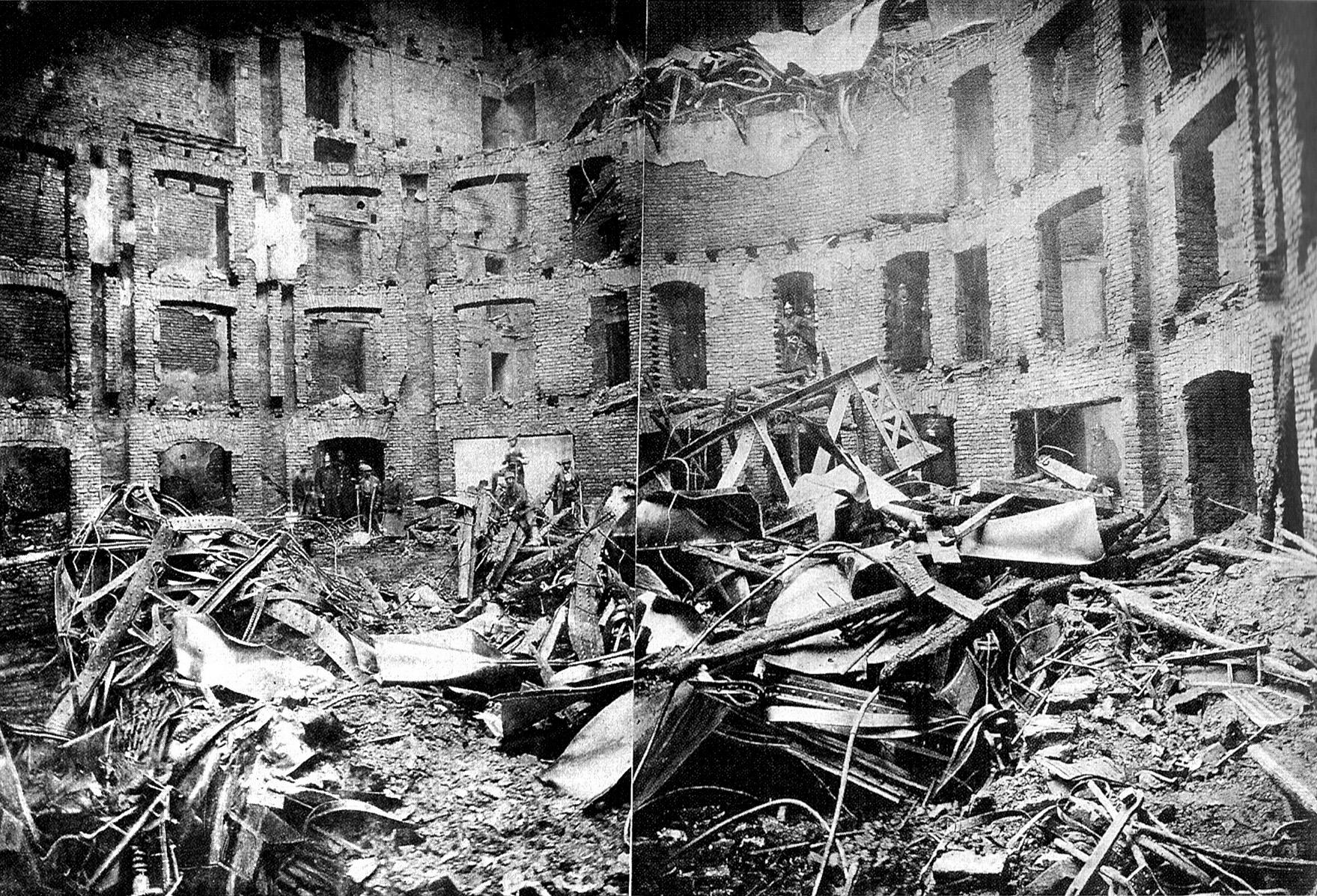 Die Brandruine des Ringtheaters am Schottenring 7 in Wien am 8. Dezember 1881 (Überarbeitung für Bilderwerkstatt)